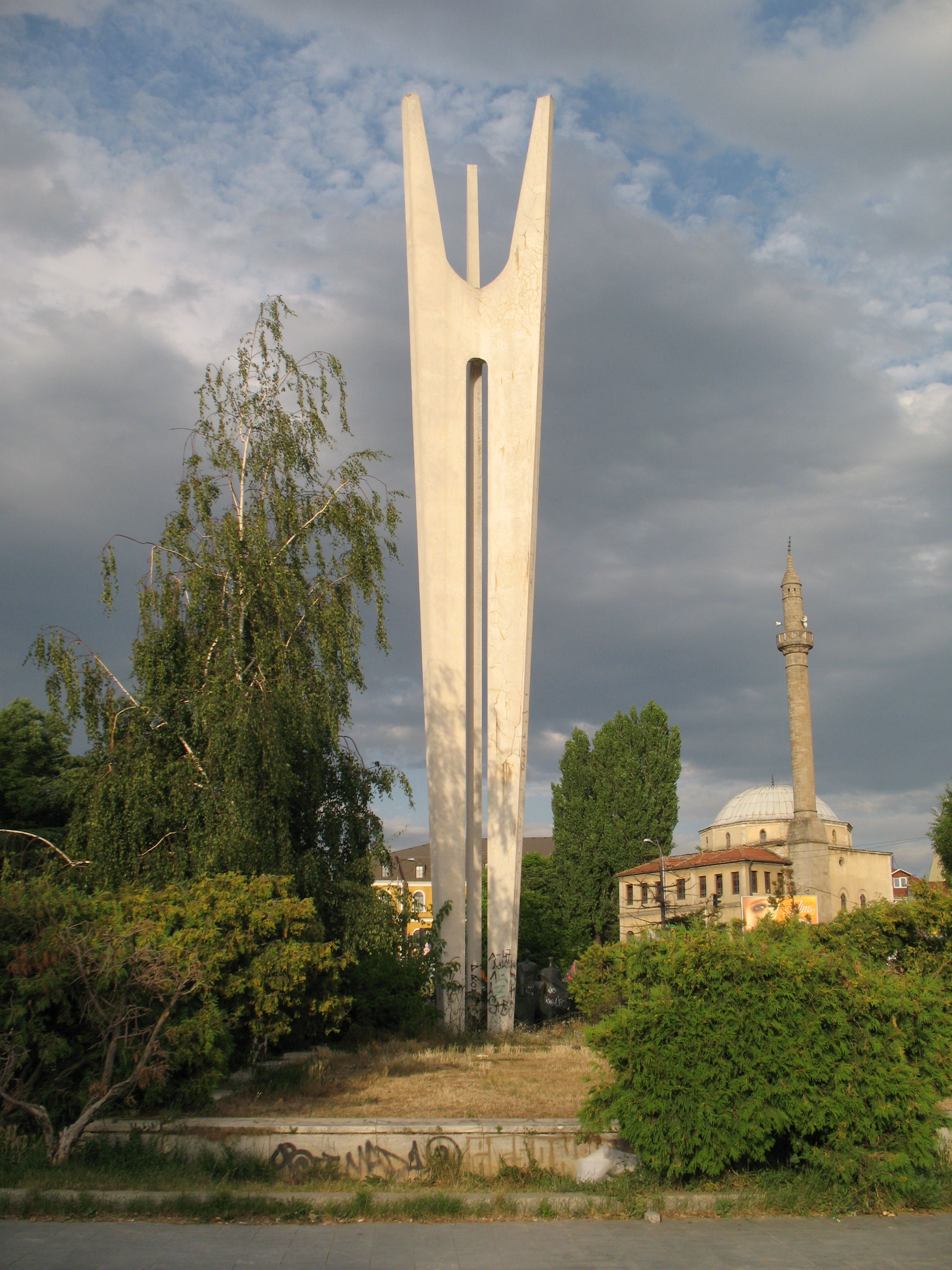 Dit Joegoslavische 'Monument of Brotherhood and Unity' is echt wat je noemt een kunstwerk uit vervlogen tijden. De drie uiteinden staan voor de drie etnische groeperingen in Kosovo: Serven, Turken en Albanen.